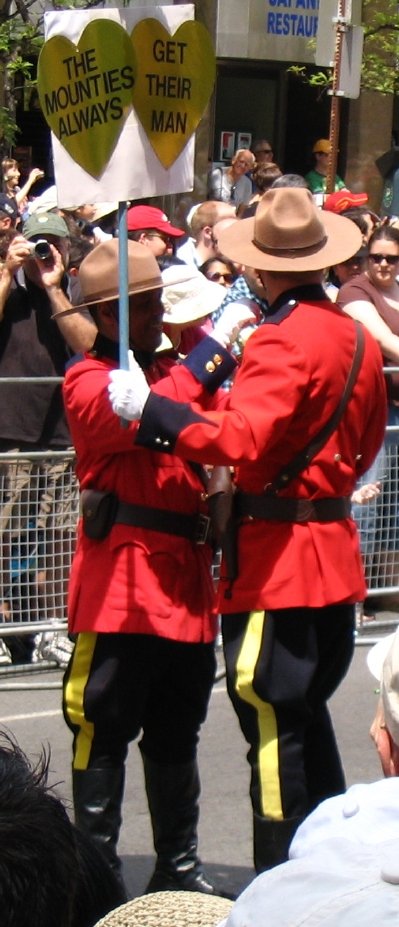 Toronto Gay Pride Mounties 2006